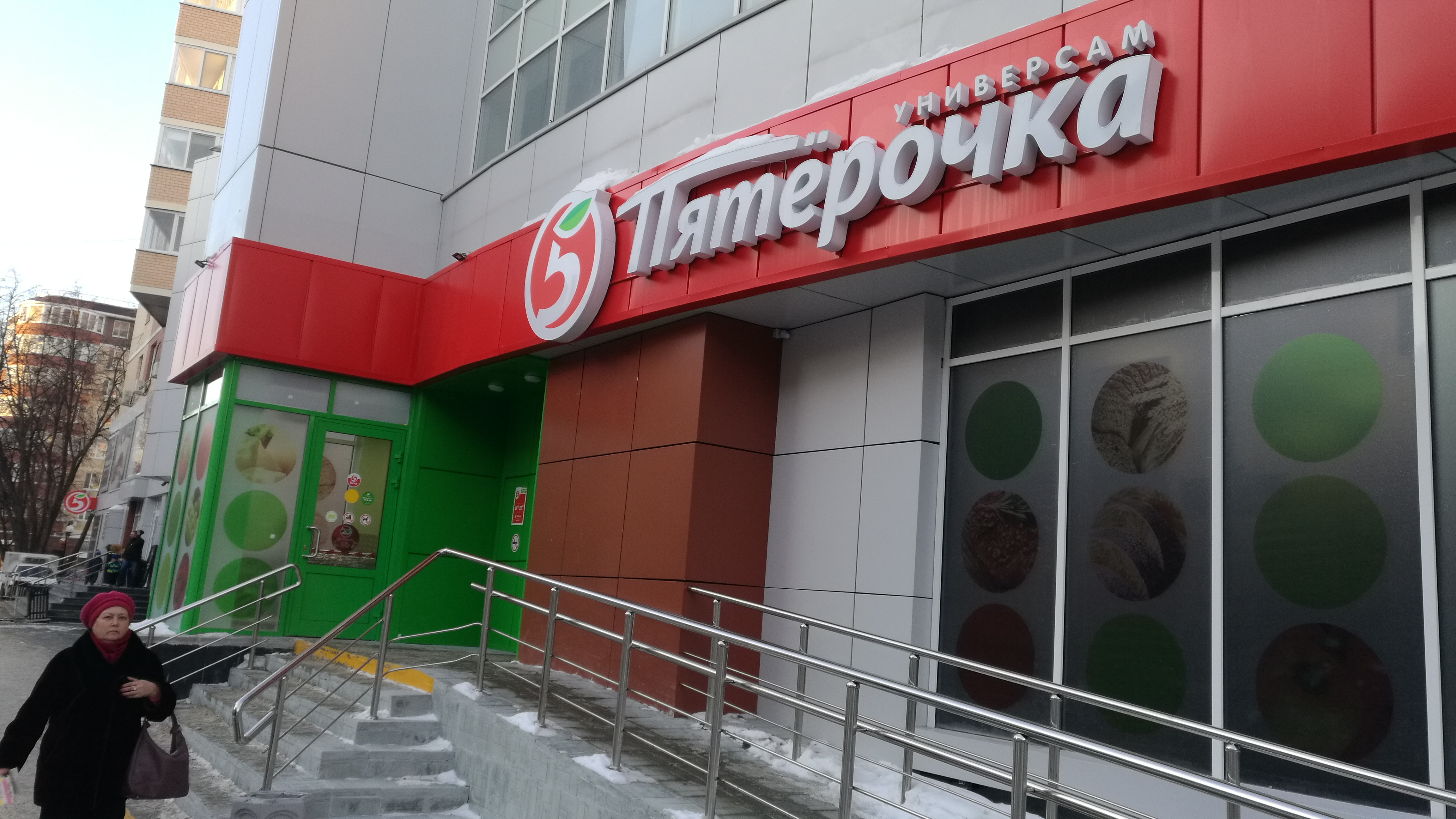 Manĝaĵvendejo en loĝdomo sur strato Fabriĉnaja 9. Tjumeno, Rusio.